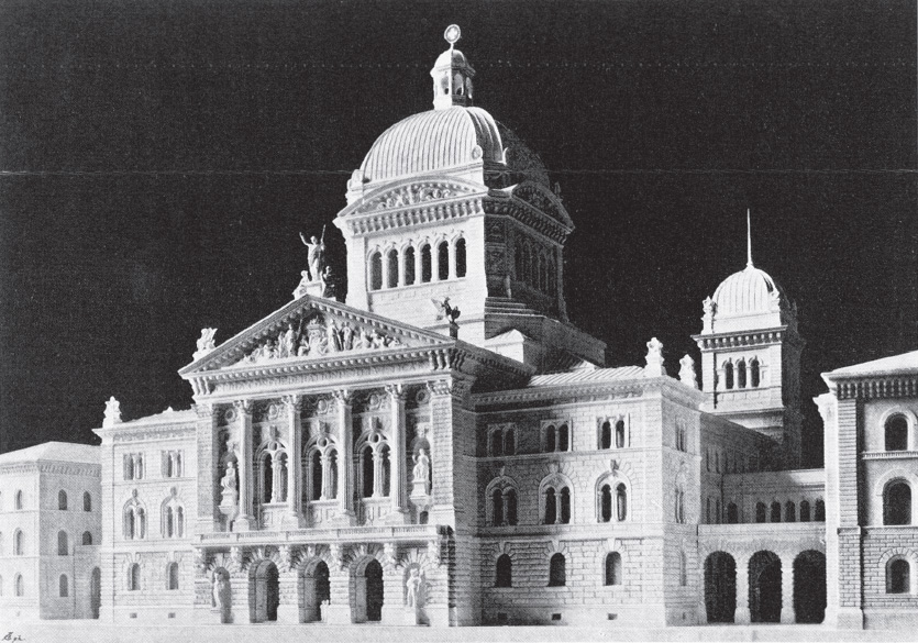 Gipsmodell des Parlamentsgebäudes in Bern, angefertigt von Anselmo Laurenti, ausgestellt 1895 an der Jahresversammlung des SIA und 1896 an der Landesausstellung in Genf. Stadtseitige Front mit Ständerattrakt.